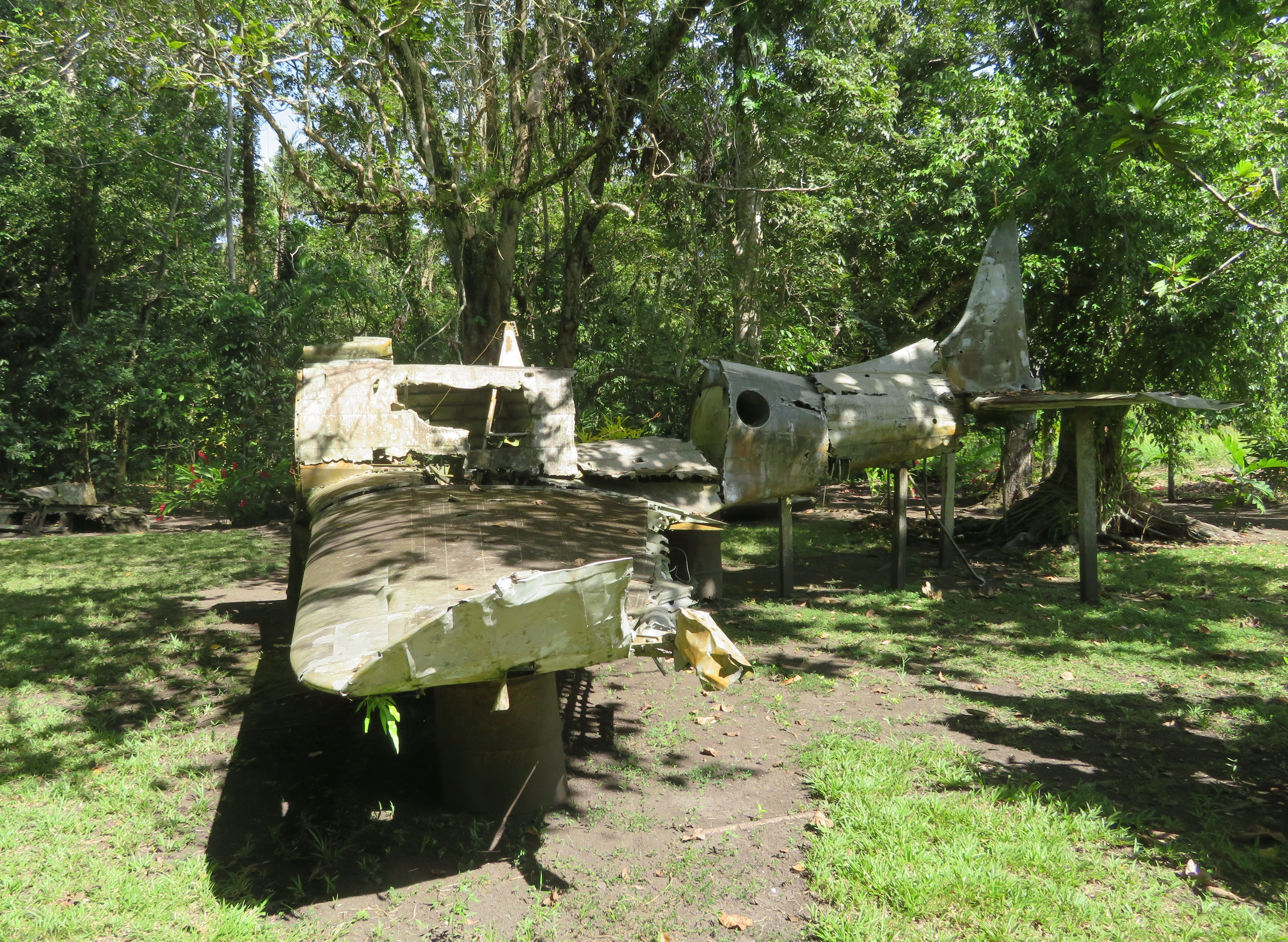 SBD-5 Dauntress at Vilu War Museum, Guadalcanal, Salomonen